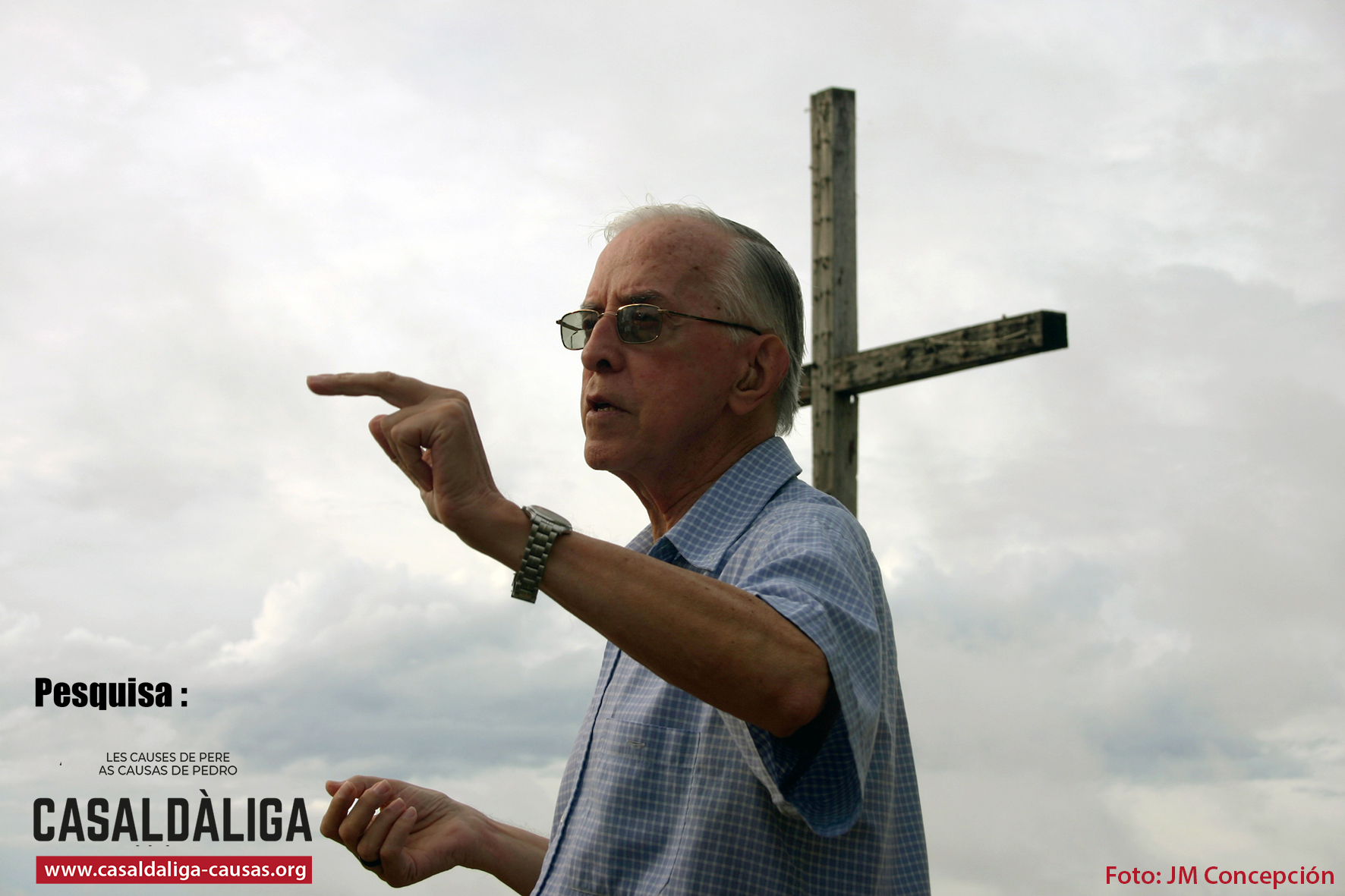 El obispo Pedro Casaldáliga ha destacado por su compromiso radical con los campesinxs sin tierra y los pueblos indígenas